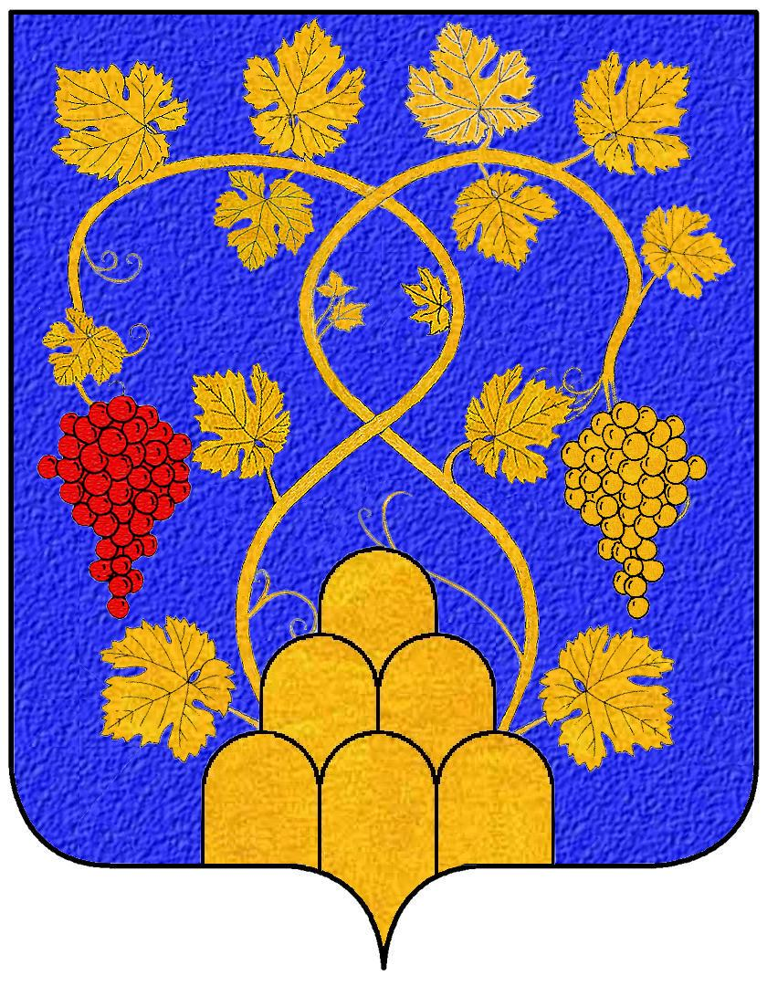 Arme famiglia Ruspoli di Roma - Di azzurro, al monte di sei colli all'italiana, di oro, con due tralci di vite, bianca e rossa al naturale, decussati e ridecussati, nodridi sulla vetta dei colli inferiori laterali, cadenti vero la punta, ciascuno con grappini ed un grappolo